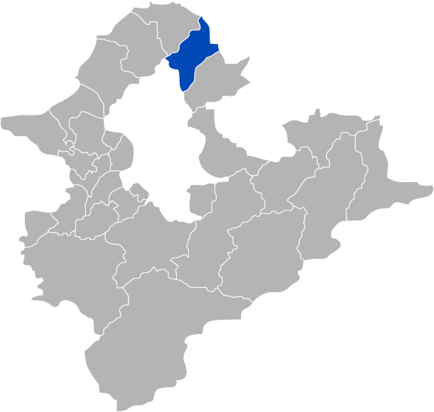 KaurJmeb為編輯中華民國臺灣省臺北縣金山鄉，於2005年2月7日所繪。